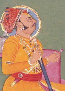 Ajit Singh